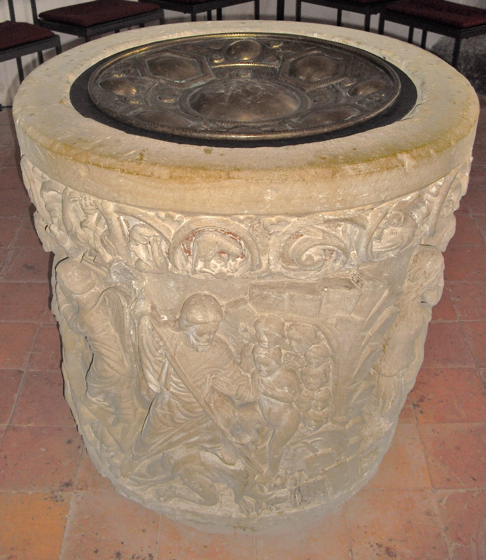 Evangelisch-lutherische Kirche in Middels (Stadtteil von Aurich, Landkreis Aurich, Niedersachsen, Deutschland): Taufstein